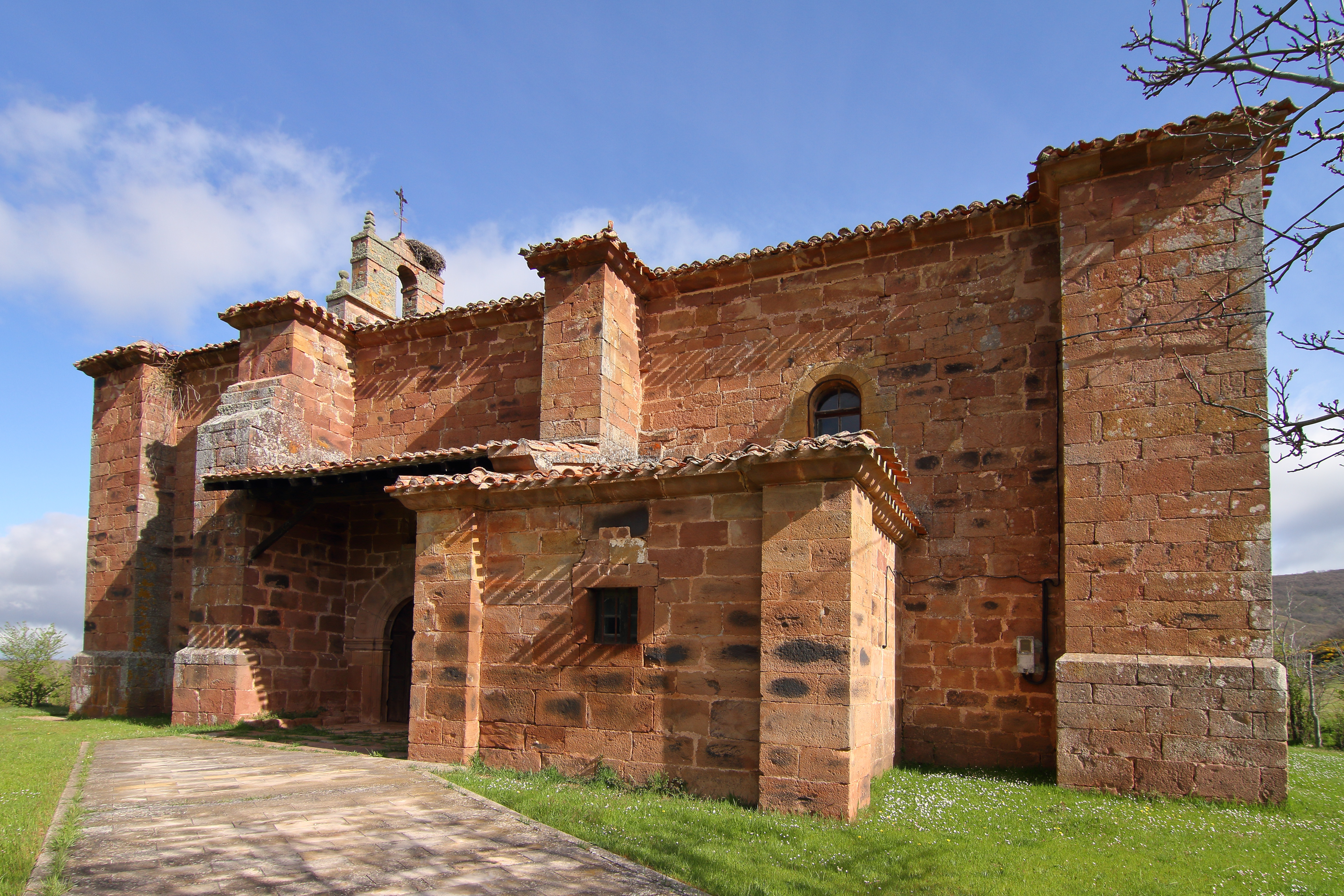 Villamiel de la Sierra, Iglesia de San Pedro Ápostol, 04